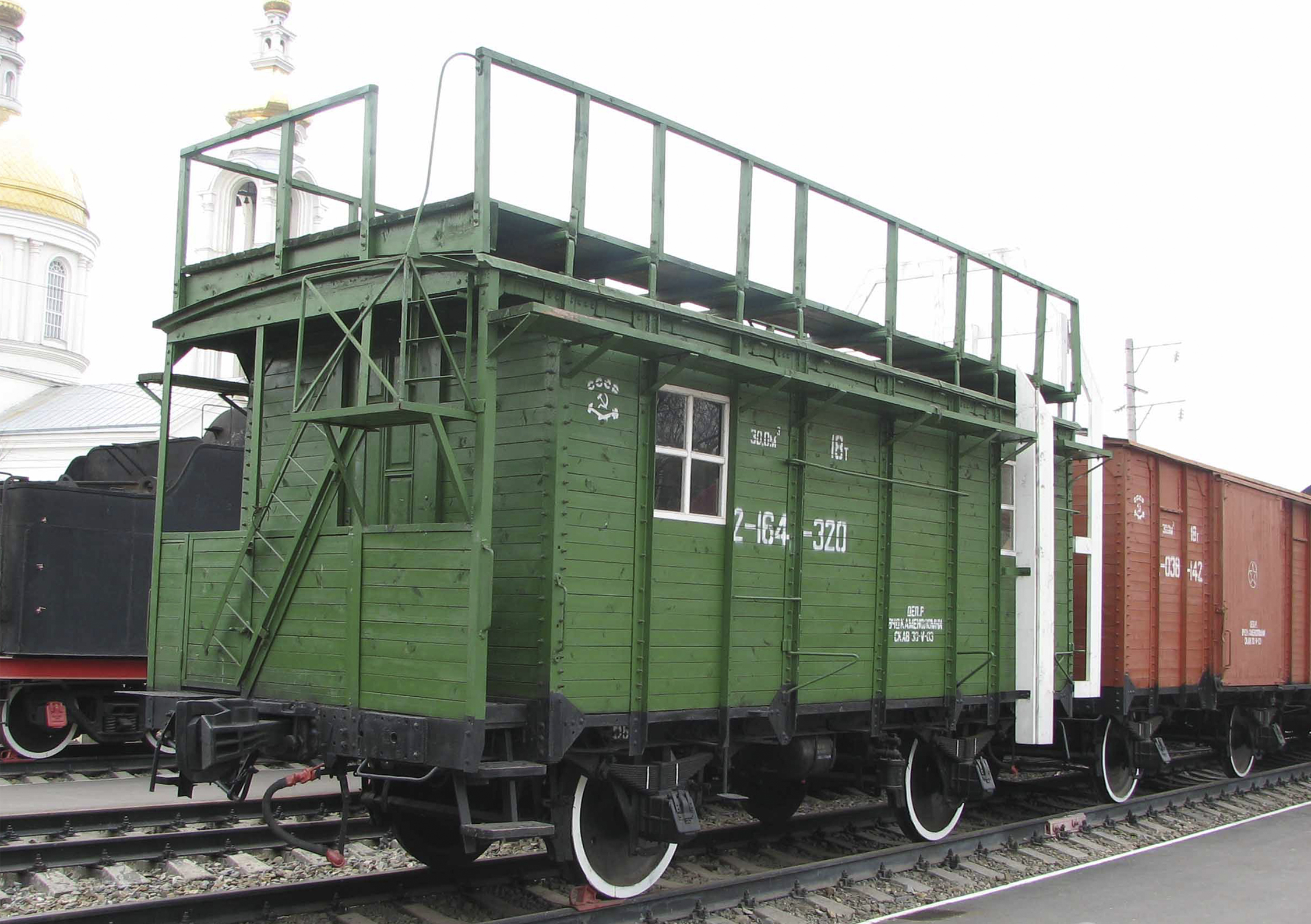 Вагон построен в 1920-х годах